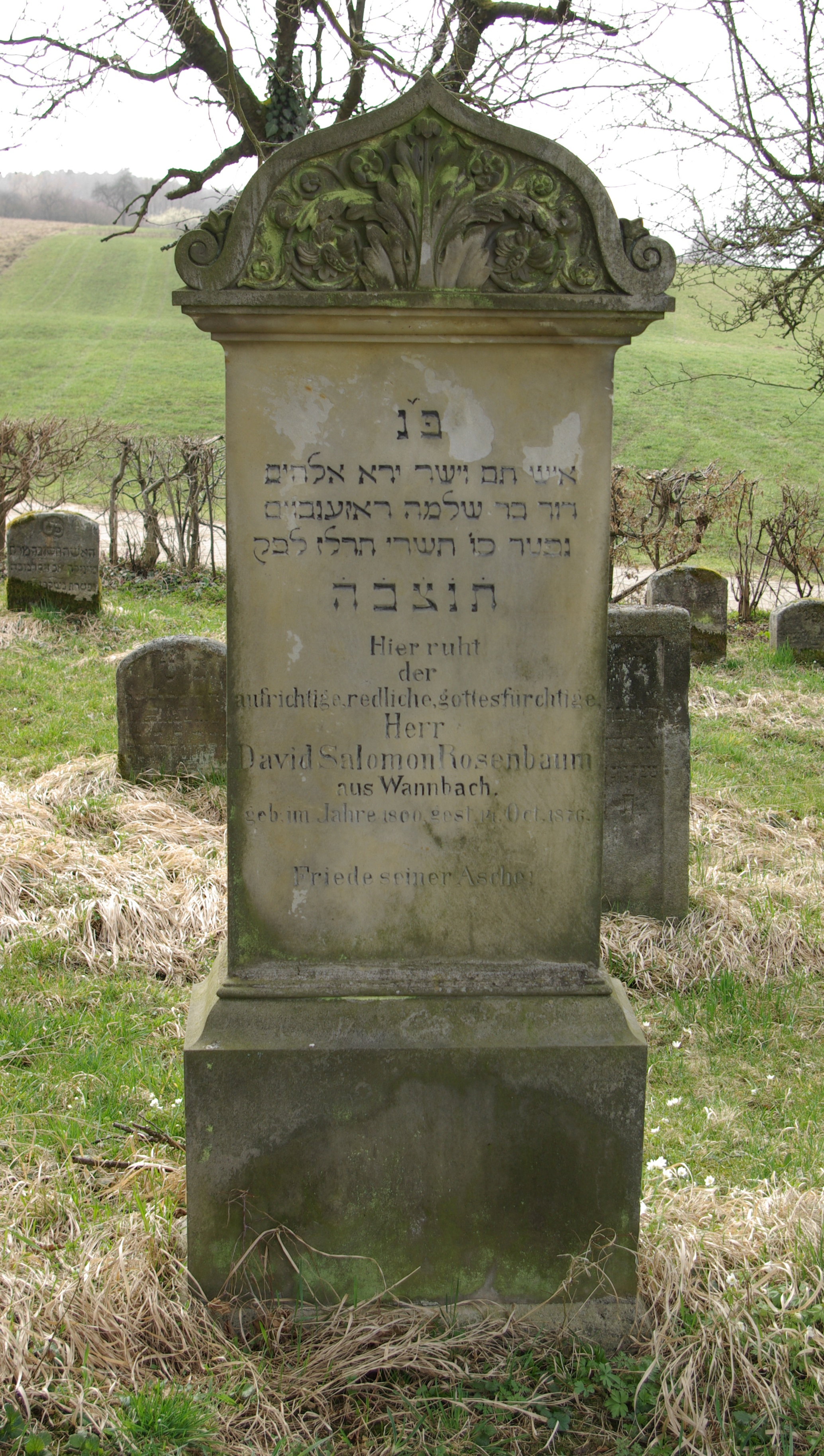 Grabstein für David Salomon Rosenbaum (1800-1876) auf dem Jüdischen Friedhof in Hagenbach (Pretzfeld)